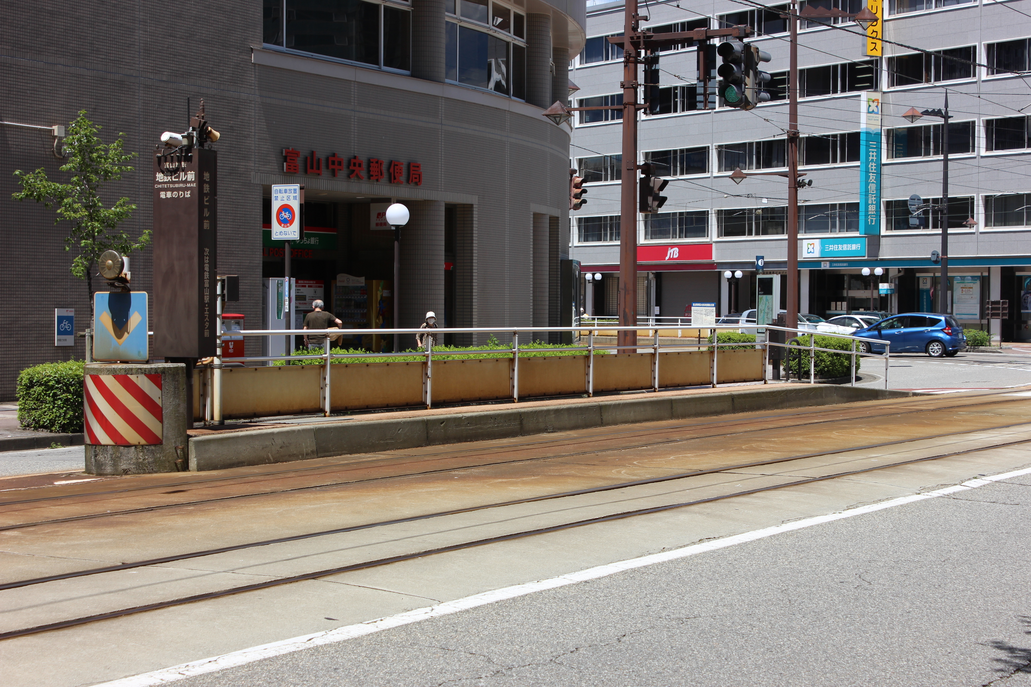 富山地方鉄道富山軌道線地鉄ビル前停留場